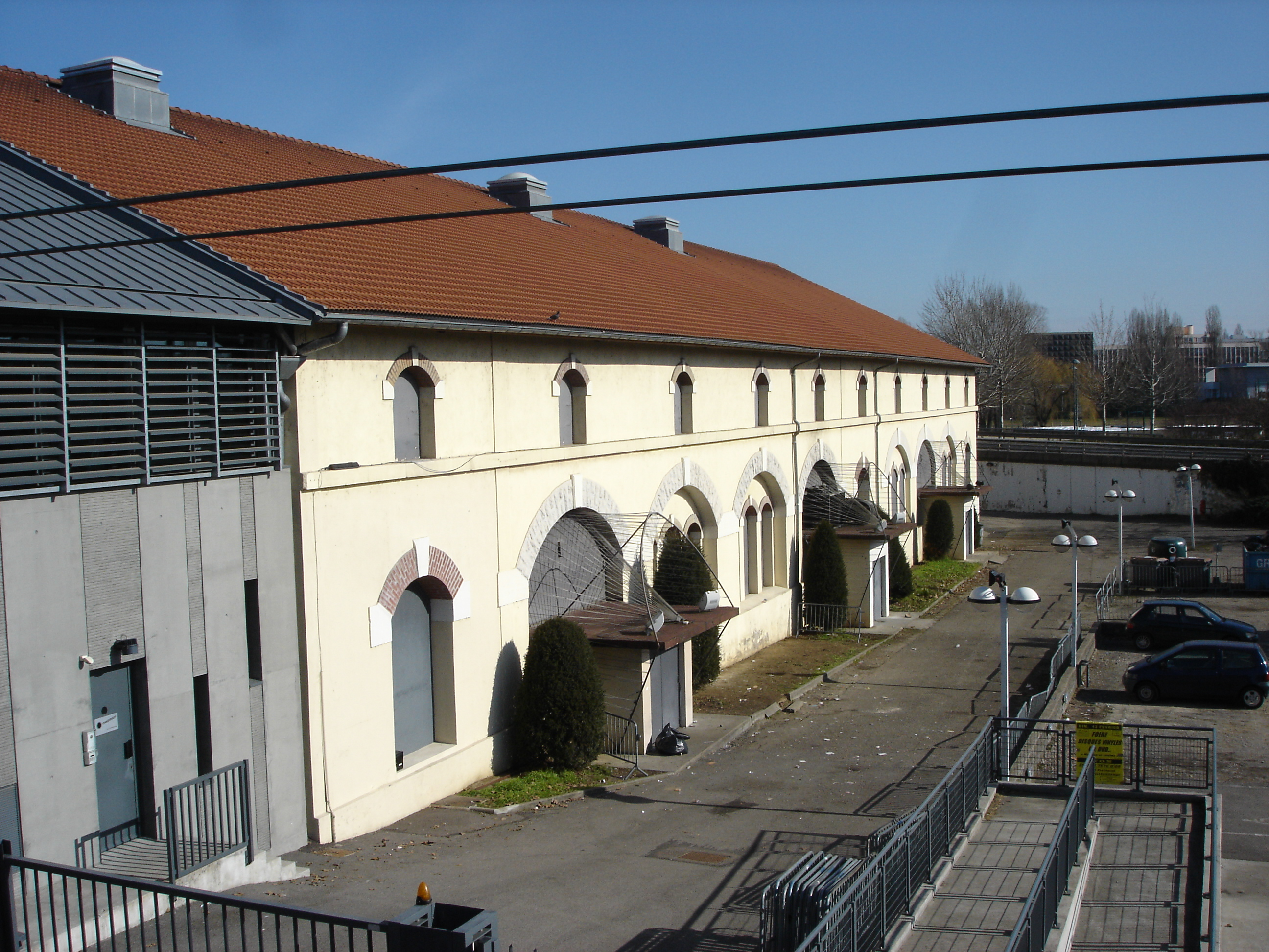 Vue du sud de la salle de concert du Transbordeur, situé au nord-ouest de Villeurbanne.